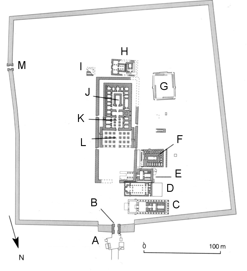 Plan der Tempelanlage von Dendera A. Römische Kioske B. Tor von Domitian und Trajan C. Römischisches Geburtshaus D. Koptische Basilika E. Ptolemäisches Geburtshaus F. Sanatorium G. Heiliger See H. Geburtstempel der Isis I. Brunnen J. Sanktuar K. Inneres Hypostyl L. Äußeres Hypostyl M. Osttor